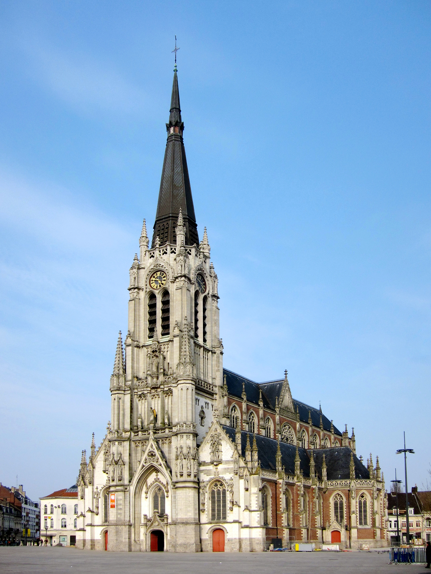 L'église Saint-Christophe à Tourcoing (Nord).